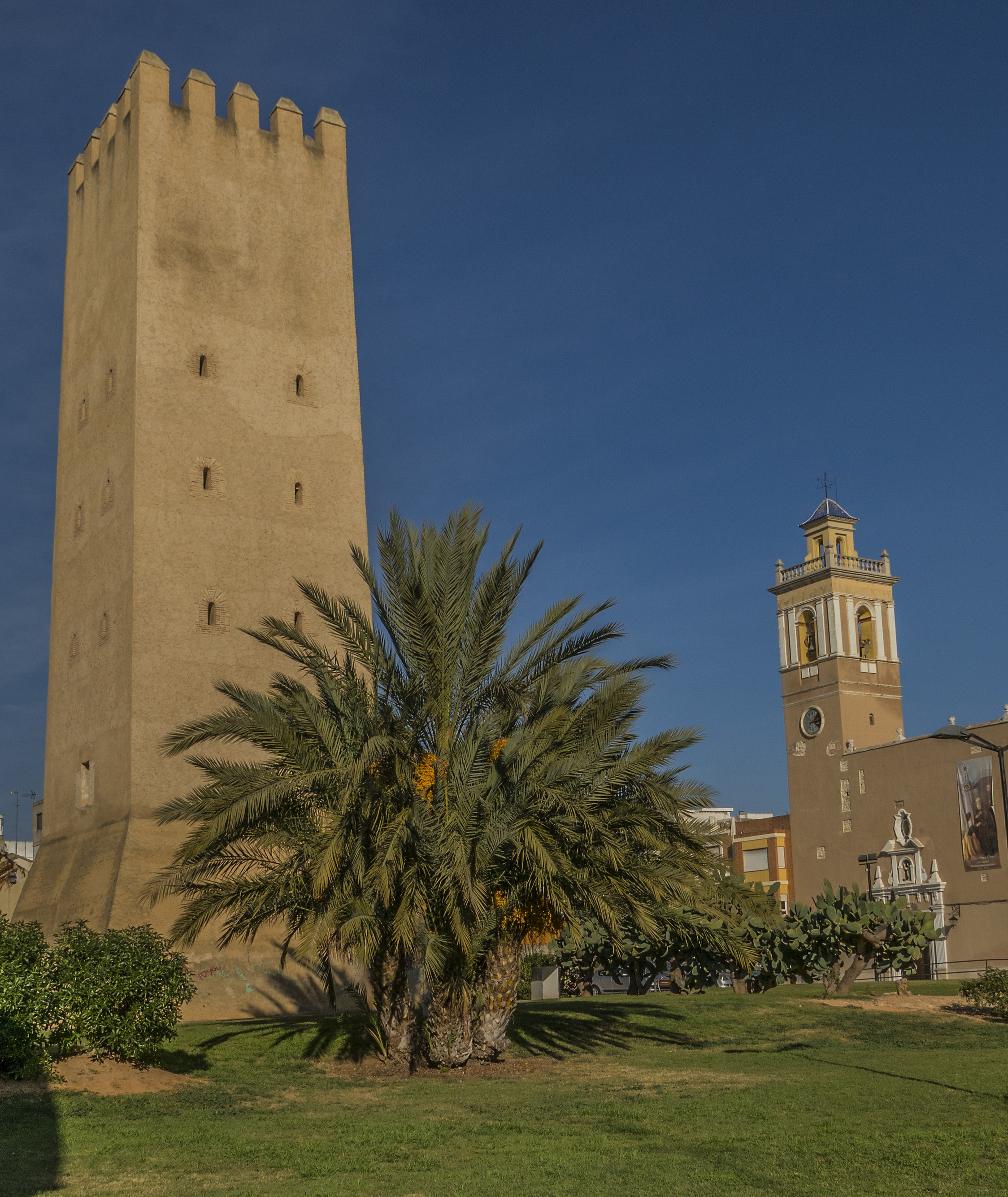 Almussafes és una vila i municipi del País Valencià situat a la comarca de la Ribera Baixa.